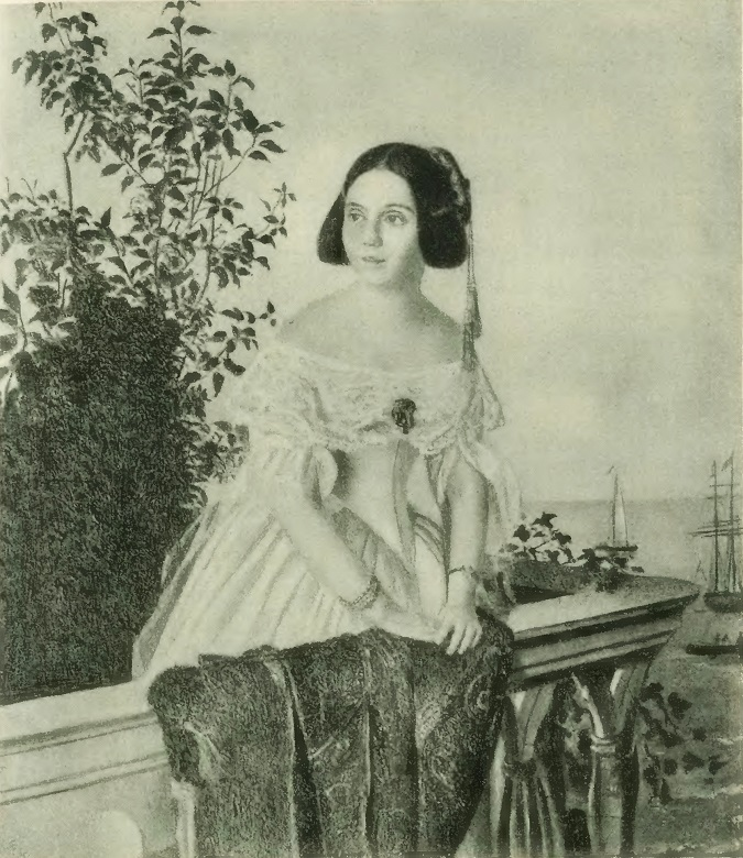 Łucja z Wawrzeckich Zabiełłowa